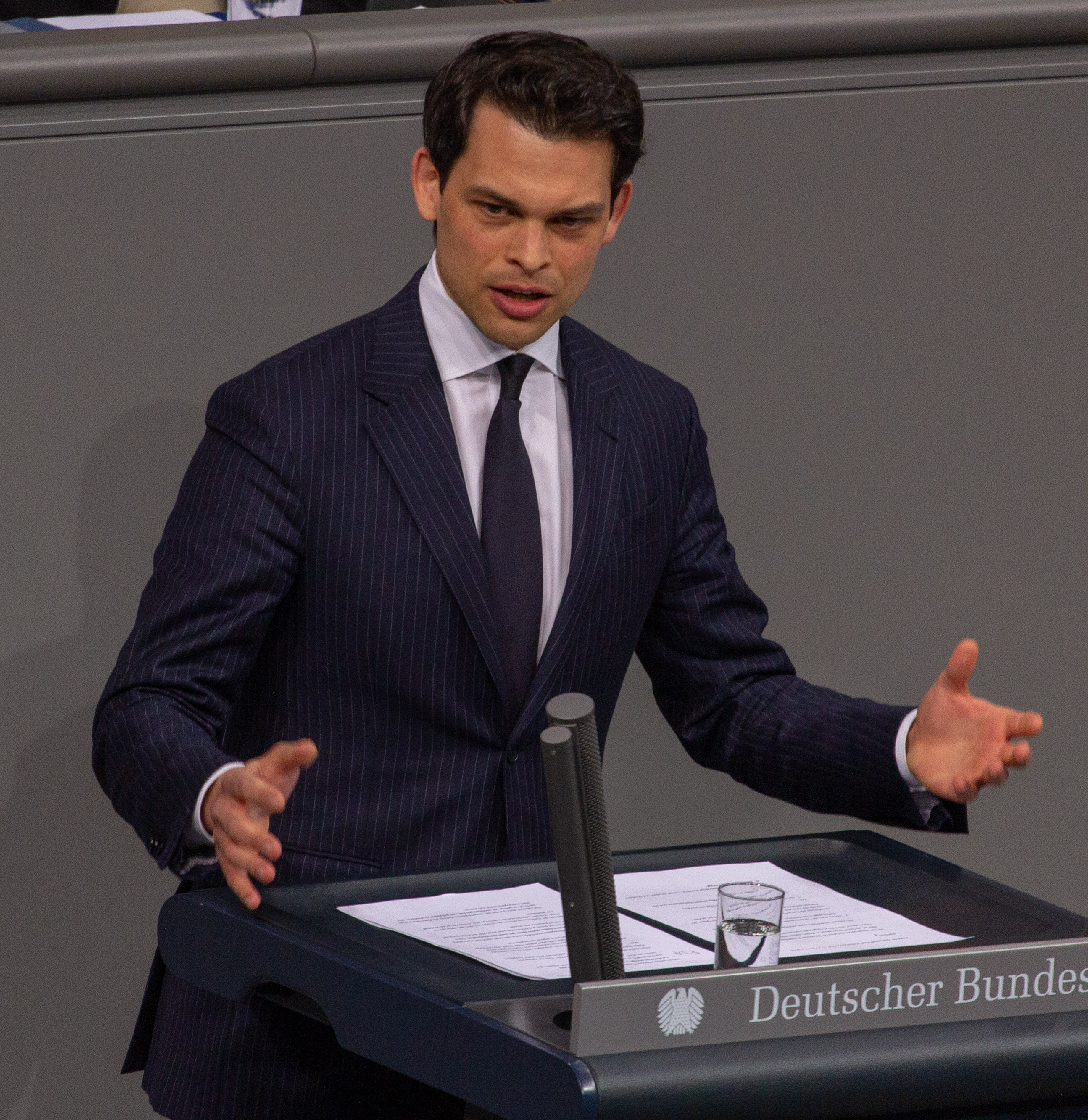 Christoph Ploß, Mitglied des Deutschen Bundestages, während einer Plenarsitzung am 11. April 2019 in Berlin.